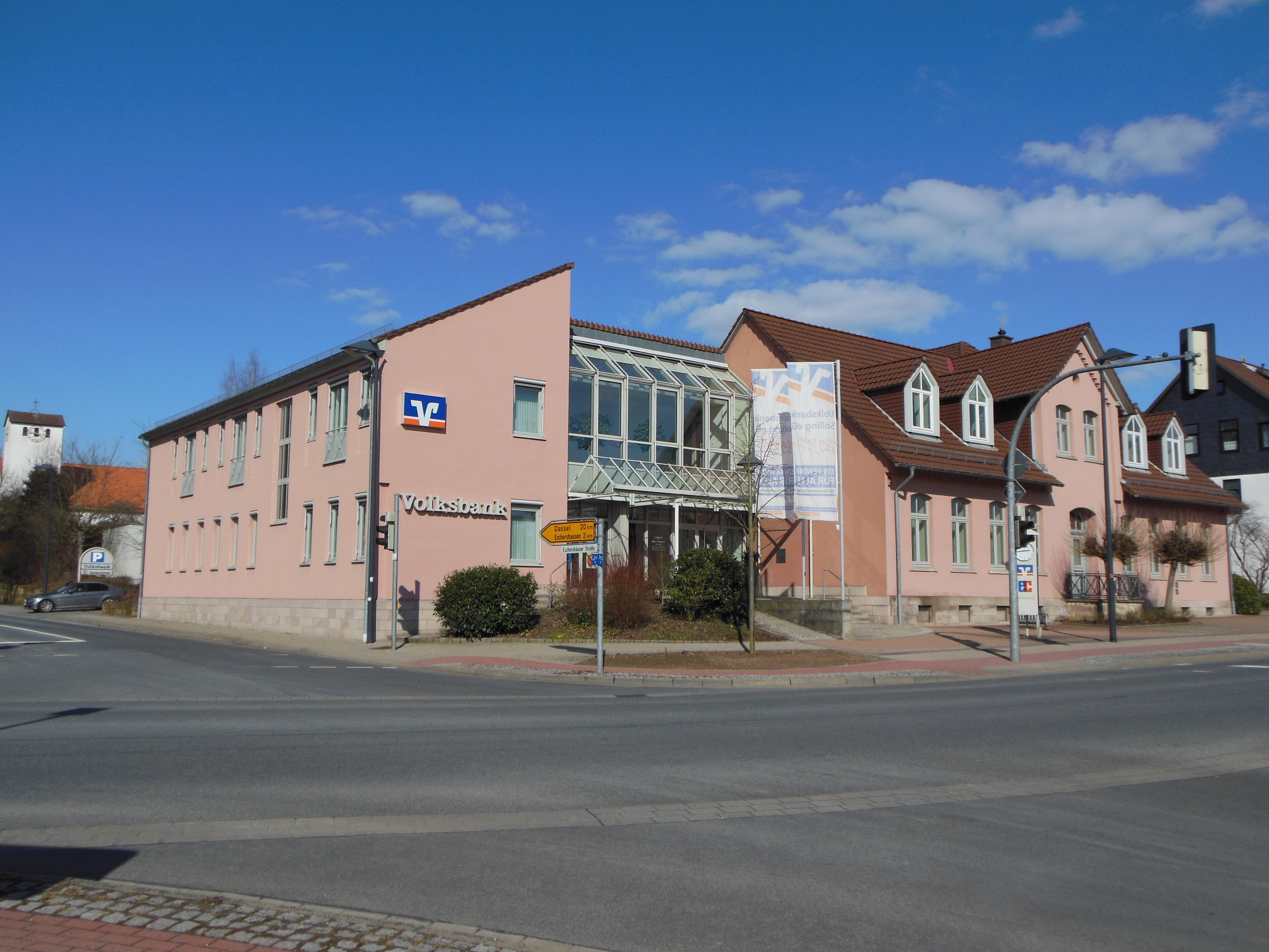 Volksbank Solling eG, Geschäftsstelle Uslar, Wolfhagen 1, 37170 Uslar, Deutschland